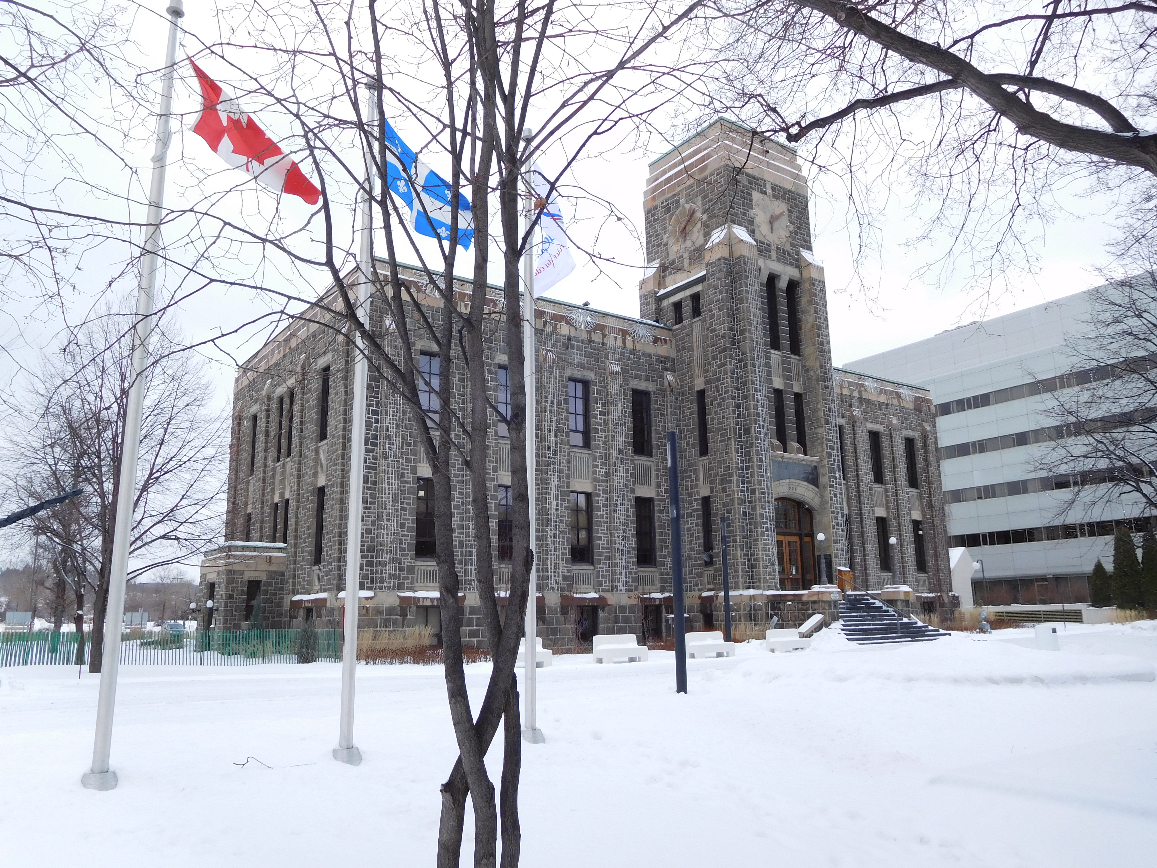 Hôtel de ville de Saguenay, 201, rue Racine Est, Chicoutimi